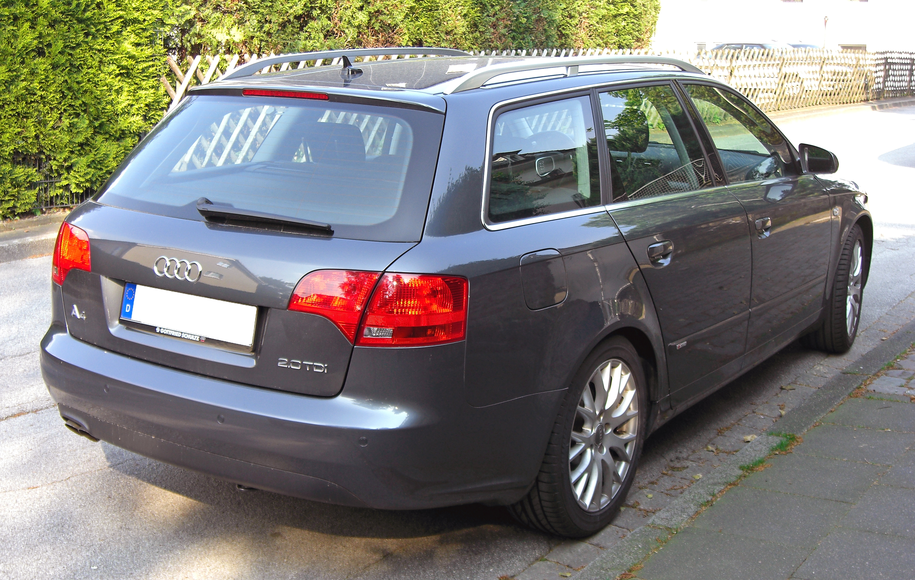 Audi A4 B7 Avant